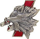 Pucelle de la deuxième escadrille de l'Escadron de Chasse 3/3 "Ardennes"